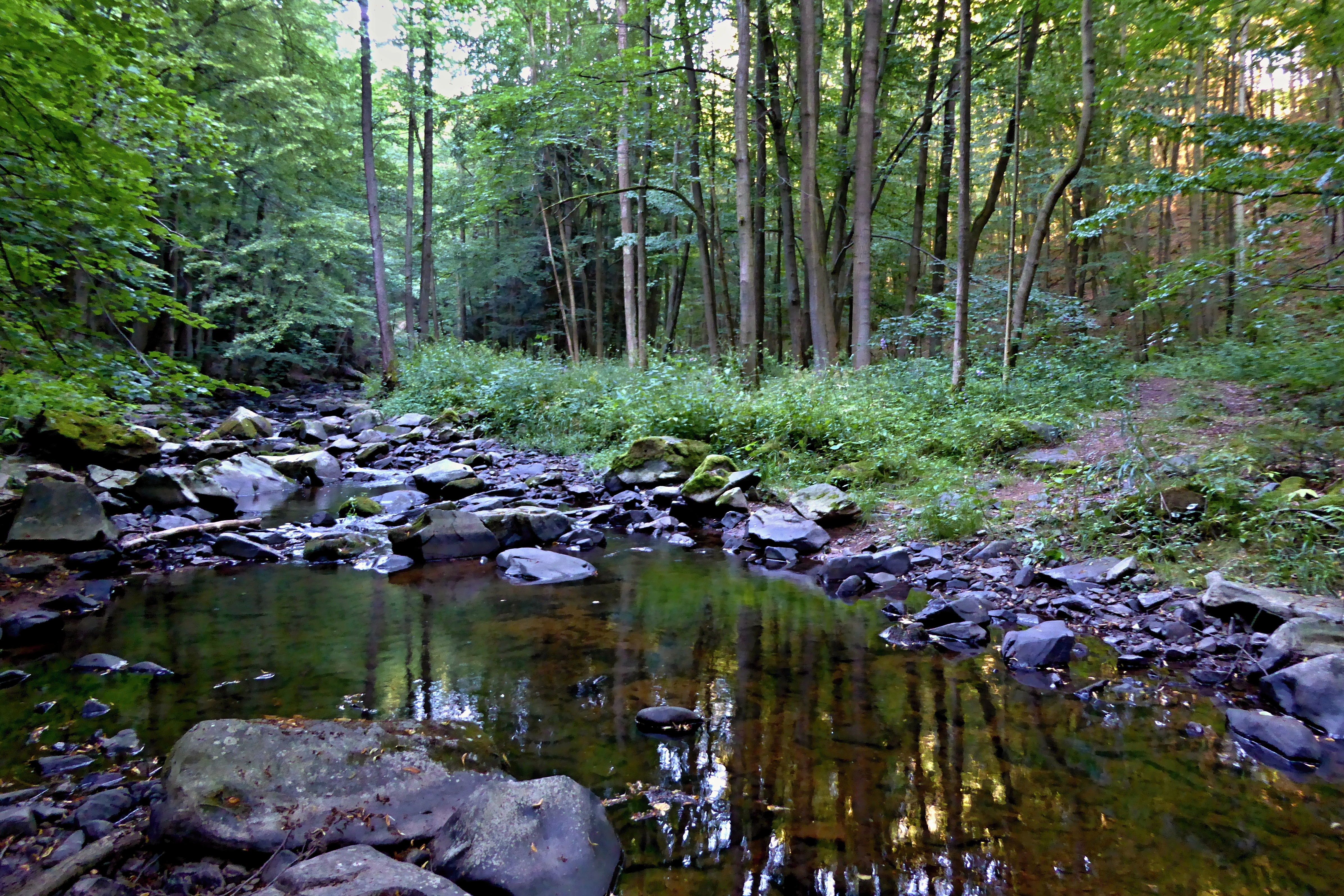 Šilinkův důl je hluboce zaříznuté údolí s balvanitým korytem meandrující řeky Krounky mezi Kutřínem a Předhradím. V některých místech se nadmořská výška na horní hraně prudkých svahů se skalními výchozy a kamennými sutěmi pohybuje kolem 450 m a dno údolí, kam jen malou měrou dopadají sluneční paprsky, leží na úrovni cca 425 m. Divoká příroda je tu zastoupena přirozenými bučinami a suťovým lesem, na dně údolí se projevuje vliv teplotní inverze a tomu odpovídající rostlinstvo (např. rosnatka okrouhlolistá). Hnízdí zde celá řada ptáků, zahlédnout lze ledňáčka, ve vlhkém prostředí lze objevit některé obojživelníky a v řece žije mihule potoční a vranka obecná. Soutěskou je vedena turistická značená trasa Klubu českých turistů, při zvýšené vodní hladině řeky je obtížně průchozí. V části trasy jsou použity žebříky přes skalní výstupy nad pravým břehem řeky. Šilinkův důl je součástí Přírodního parku Údolí Krounky a Novohradky o rozloze cca 511 ha vyhlášeného v roce 1998 za účelem ochrany členité krajiny v části údolí vodních toků Krounky, Novohradky, Hlubočického a Hradeckého potoka. Zeměpisná mapa (Mapy.cz) - viz